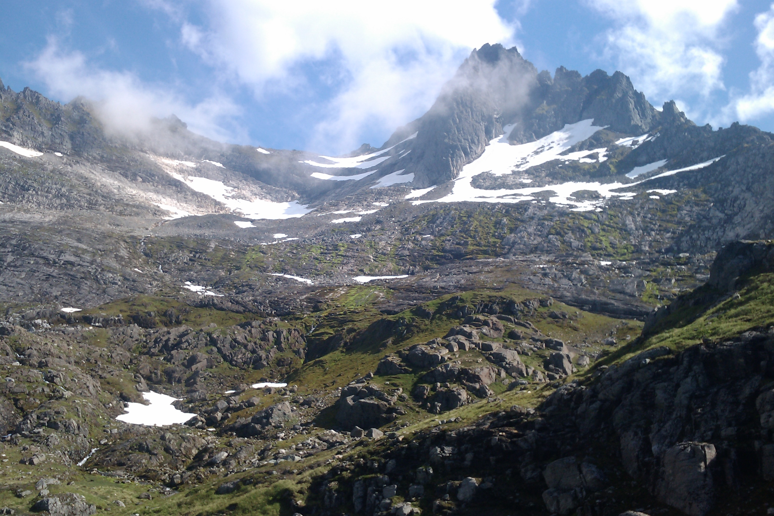 Romedalstinden